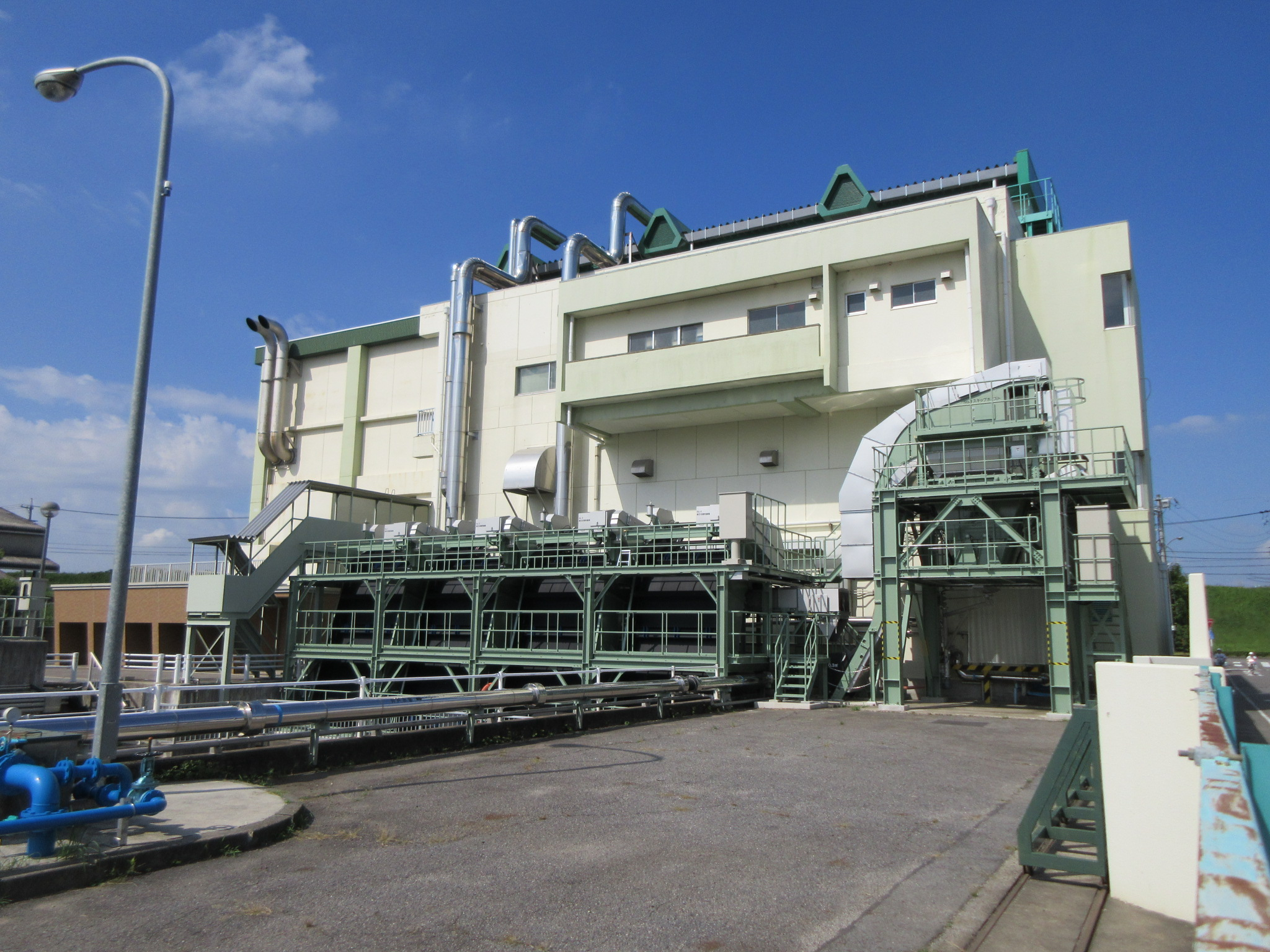 大門雨水ポンプ場（岡崎市大門）